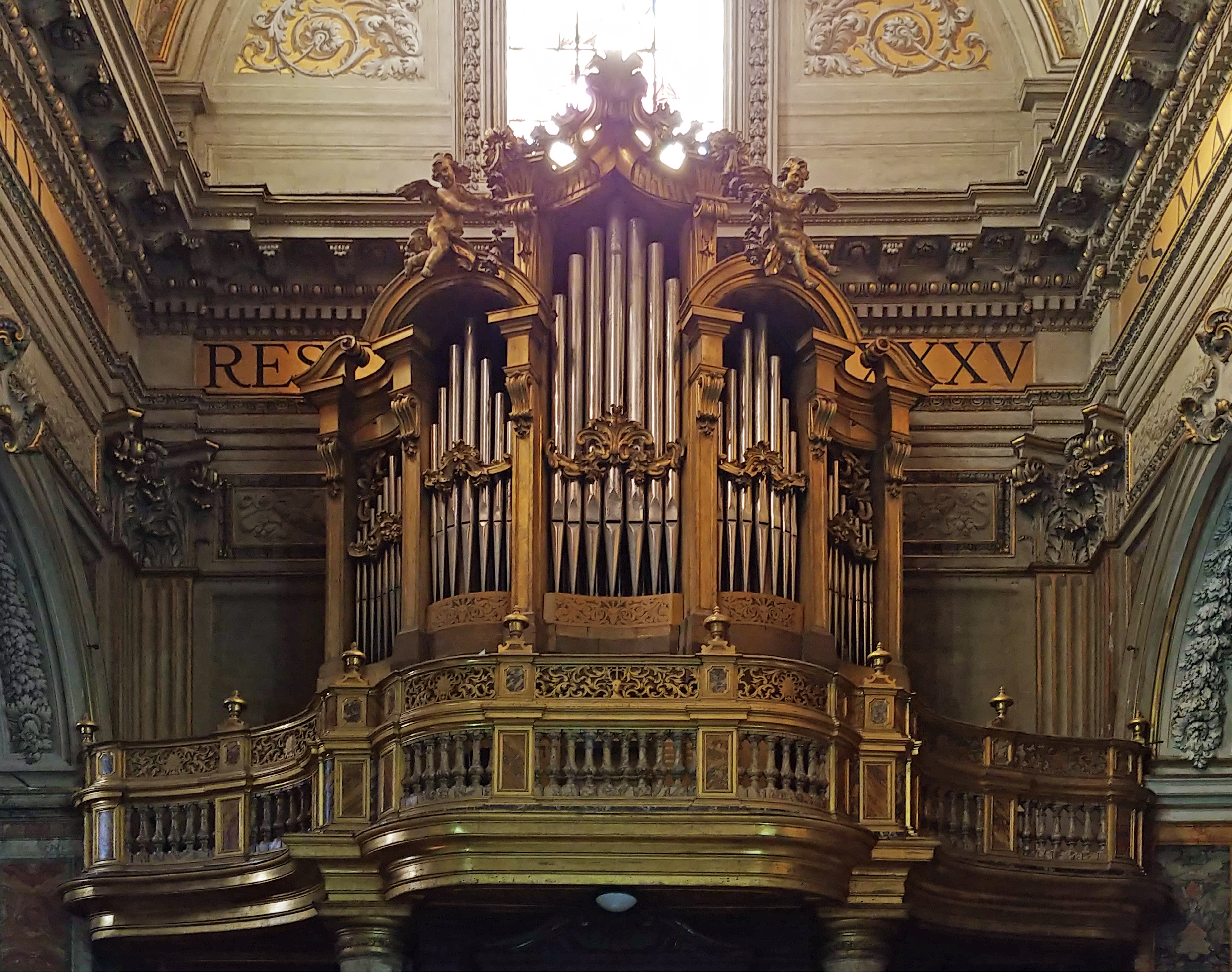 Organo Testa-Noghel-Werle (1747-1748/1768, 12/II+P).